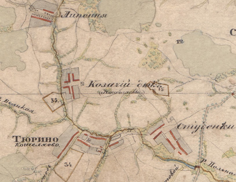 Карта ручной работы села Казачий Дюк Шацкого уезда